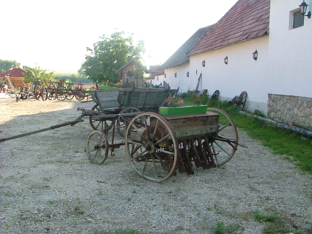 Szabadtéri kocsimúzeum (Nyúl, Magyarország)